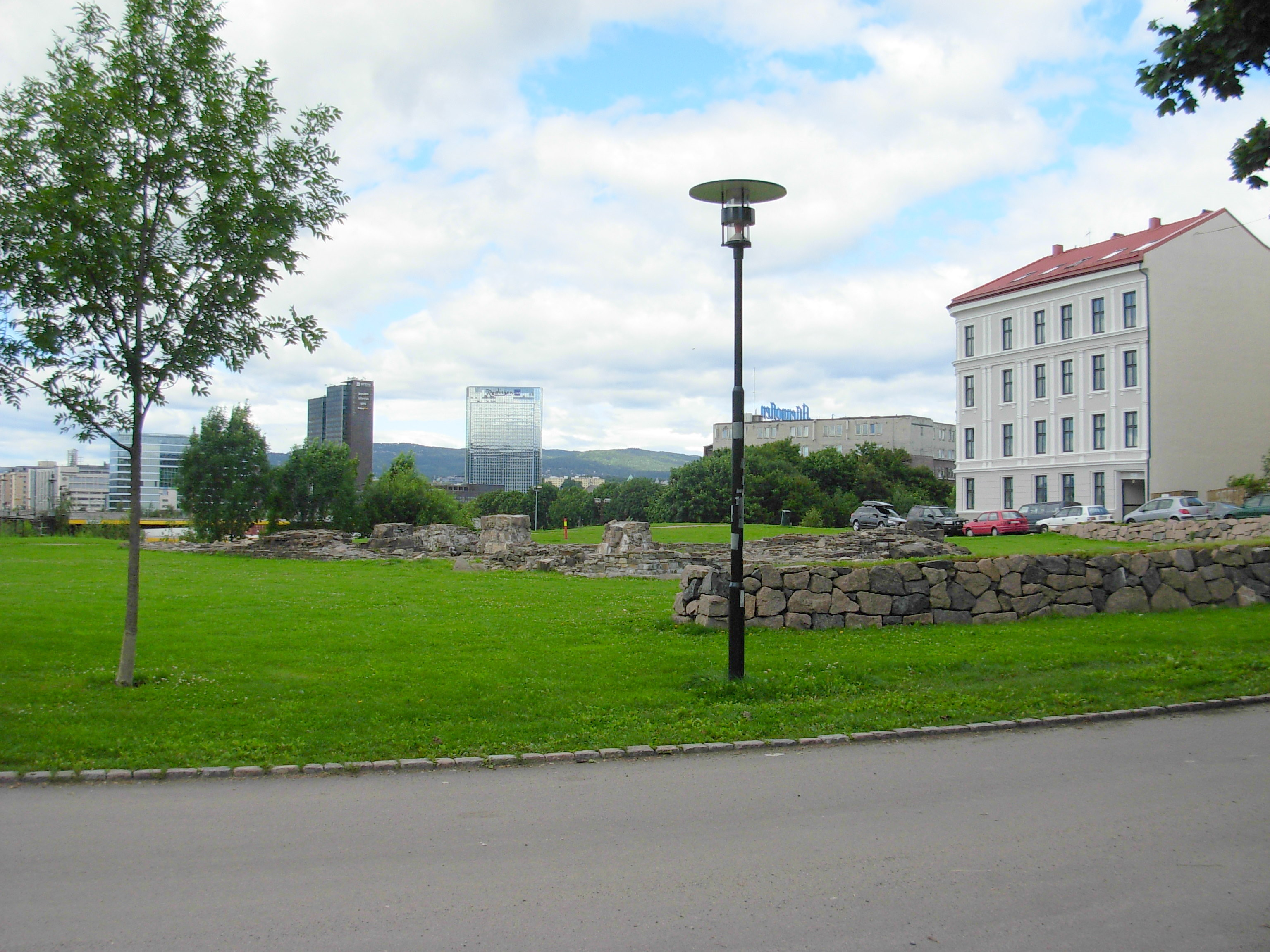 Clemens' park med ruin av Clemenskirken, Gamlebyen, Oslo